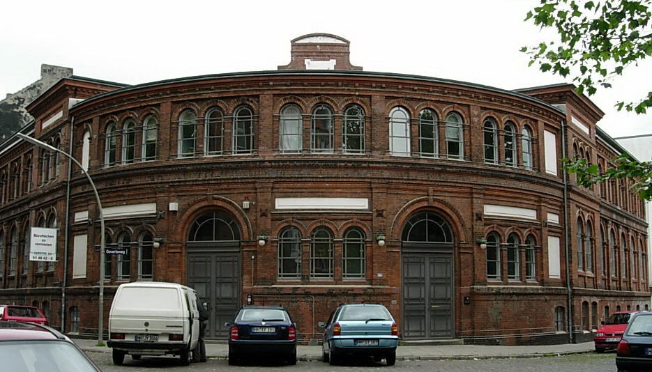 Das ehemalige Thedebad in Altona-Altstadt.